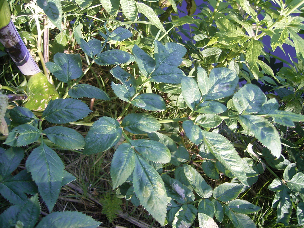 Deze foto toont het blad van de de Gewone engwortel. Ik nam deze foto op 30 jil 2005 in park het kleine hout in Den Haag. This picture shows a leaf of Angelica sylvestris. I took this pic on July 30, 2005 in The Hague, Netherlands.